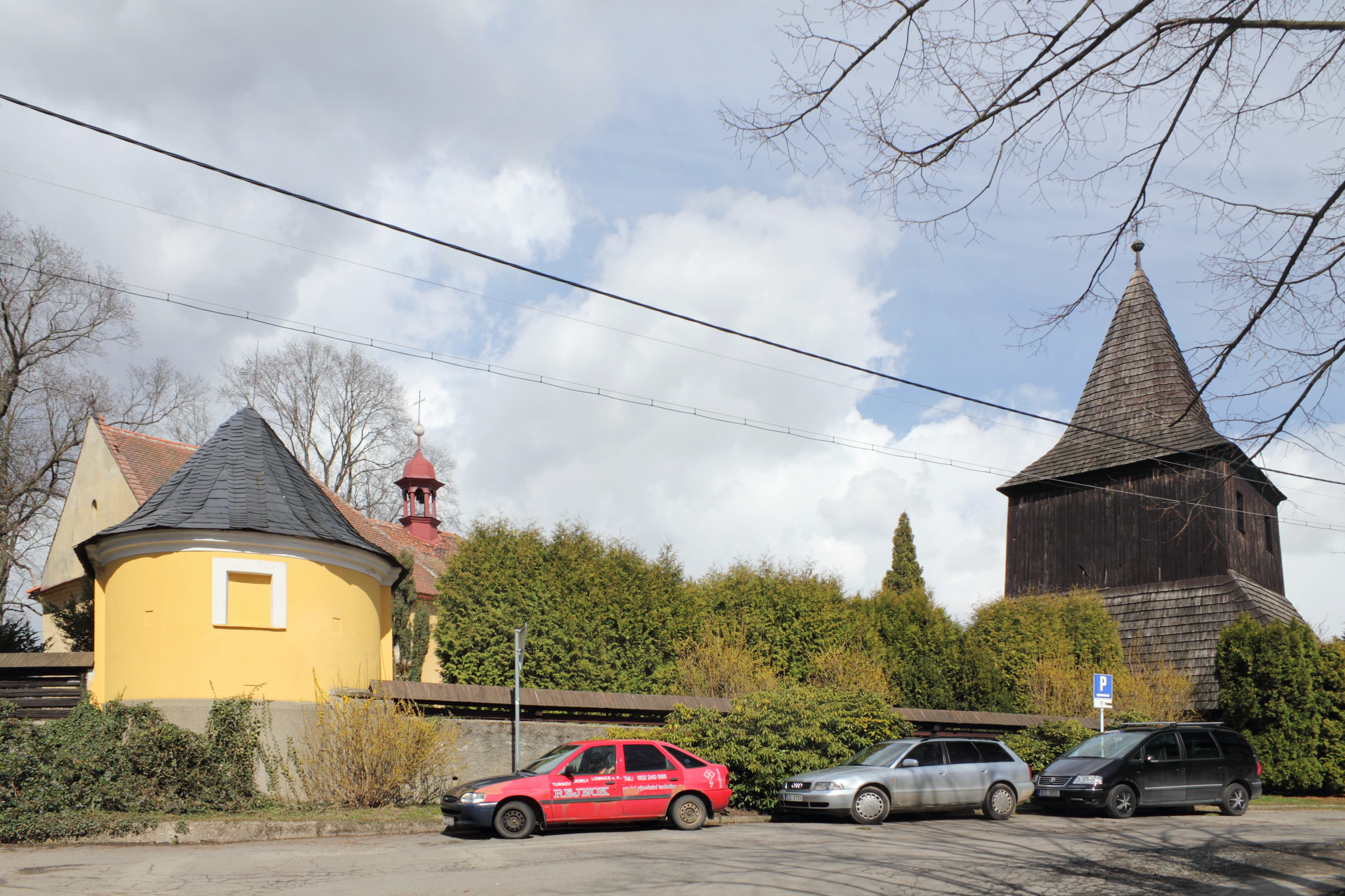 Areál kostela se zvonicí, Vlastibořice